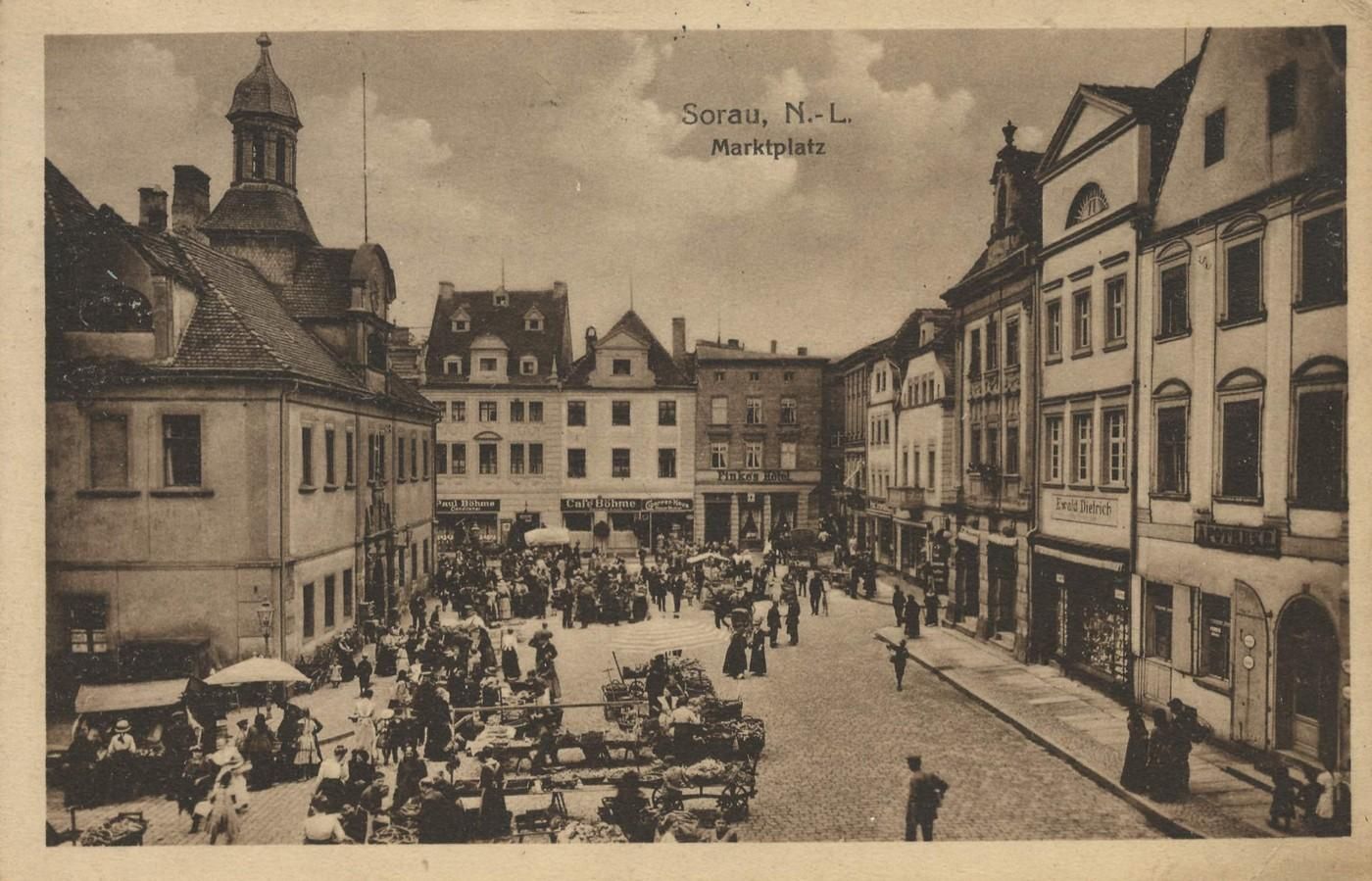 Postkarte Sorau, N.-L., Marktplatz, 1921, heute Żary, Polen.